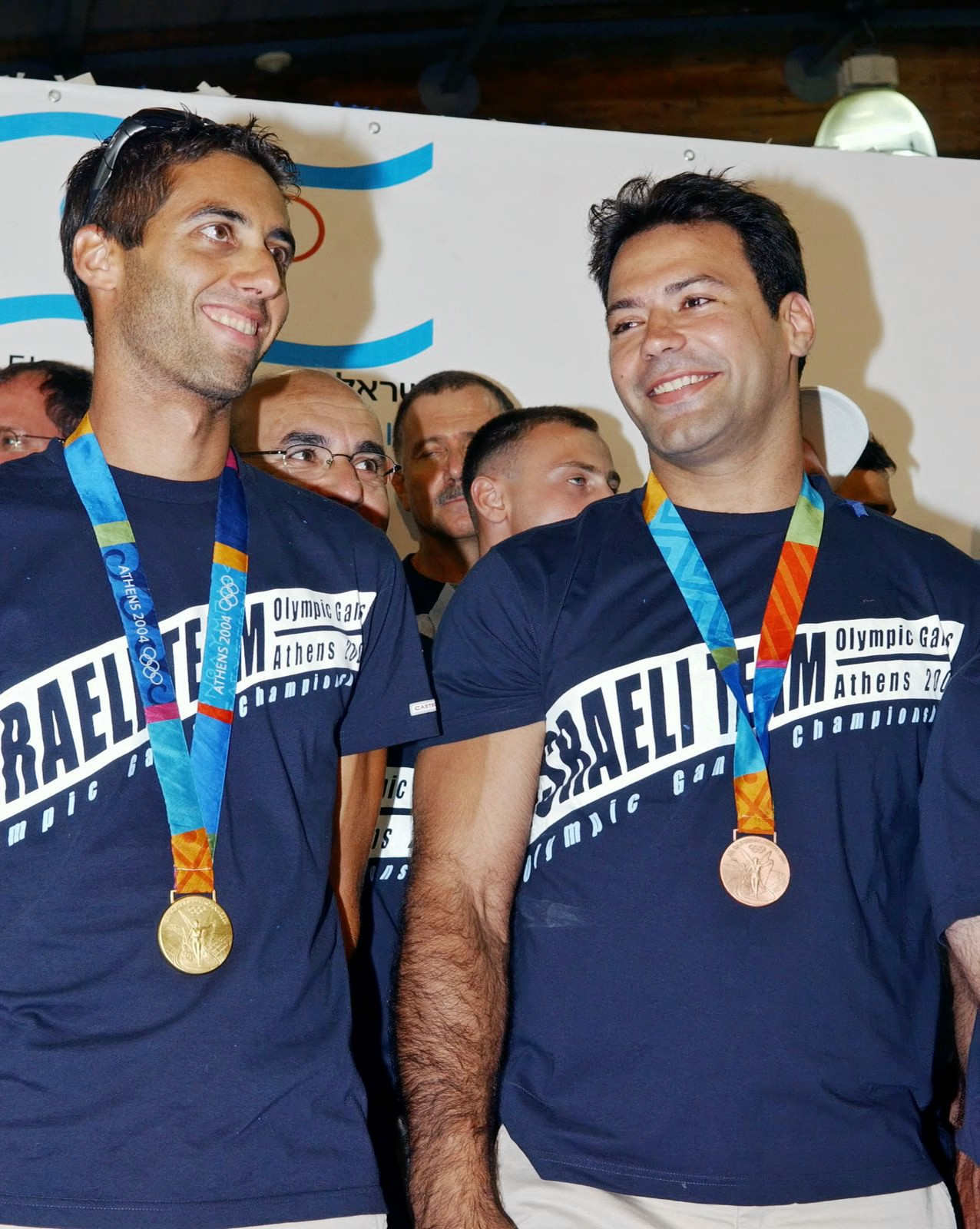 Gold Medalist Windsurfer Gal Fridman (left) and Bronze Medalist Judoka Arik Ze'evi at Ben Gurion Airport are celebrated upon their arrival from the Athens 2004 Olympic Games. זוכה מדליית הזהב בגלישת רוח, גל פרידמן (משמאל) וזוכה מדליית הארד בג'ודו, אריק זאבי, בנתב"ג עם הגעתם מהמשחקים האולימפיים מאתונה 2004.